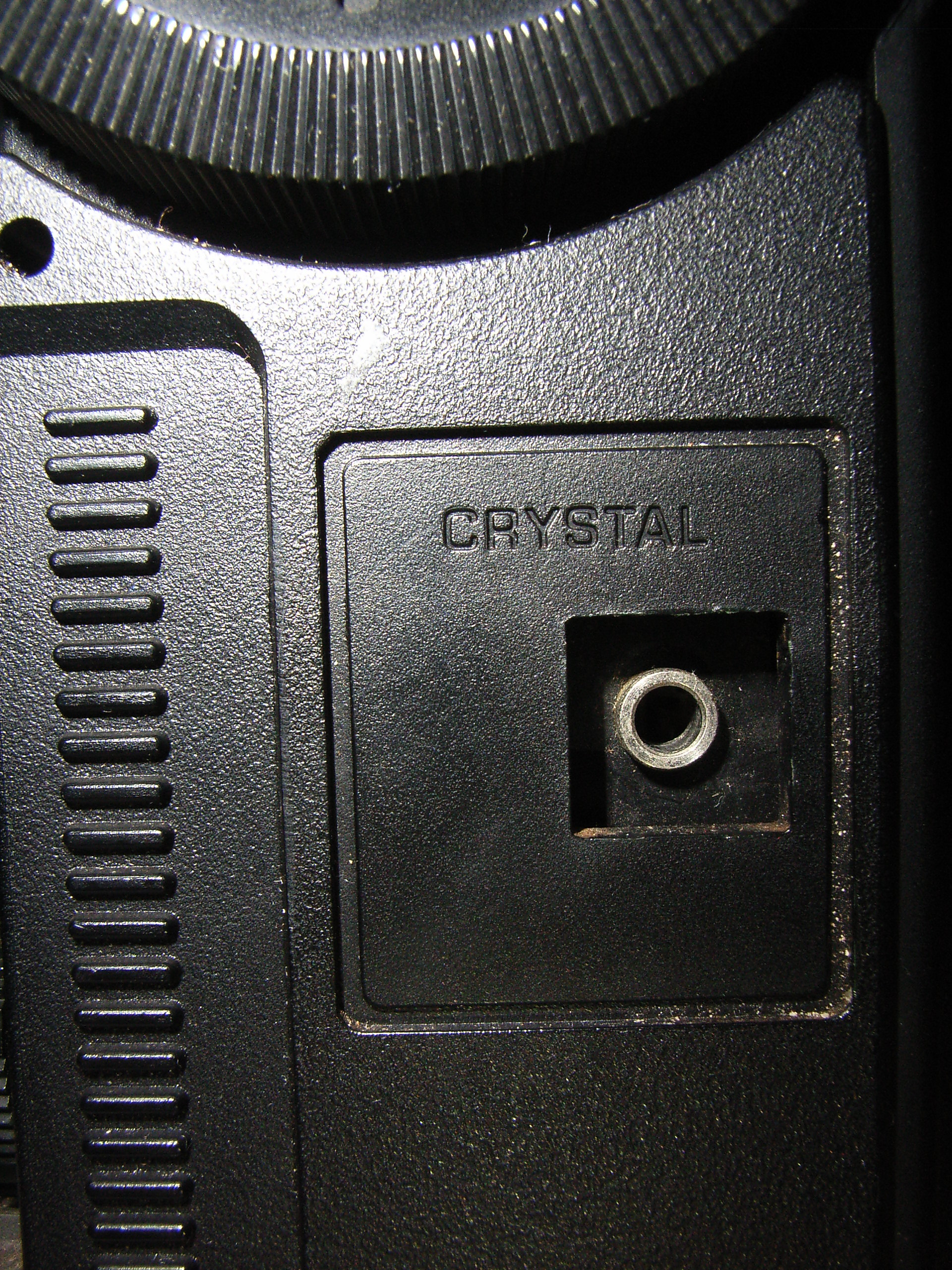 RF-877 NSBクリスタル端子